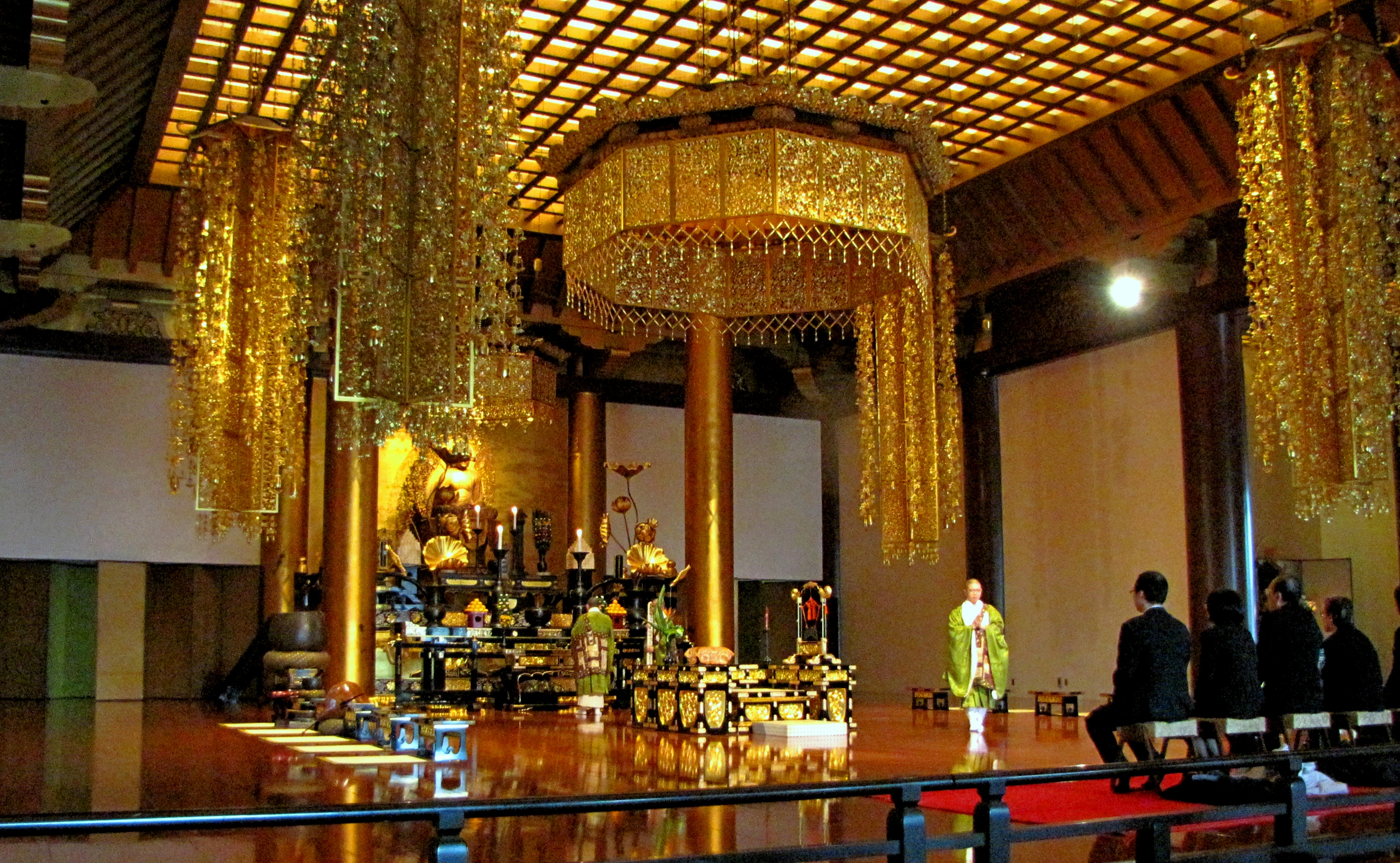 浄土宗大本山 芝増上寺 本堂